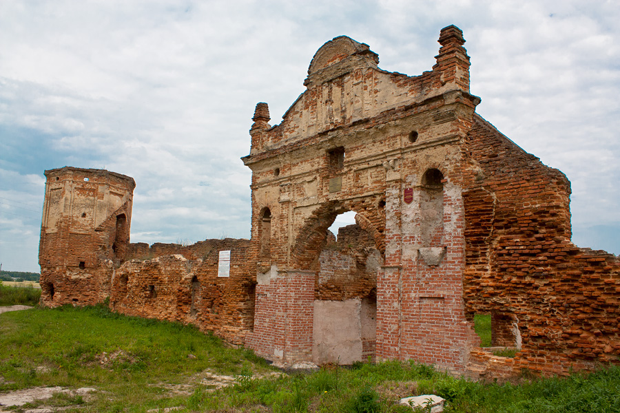 Беларуская (тарашкевіца): Рэшткі былога кляштару картэзіянцаў:брамаагароджа зь вежамібудынак шпіталя. г. Бяроза This is a photo of Belarusian heritage monument. Reference number: 112Г000133 ( WLM)